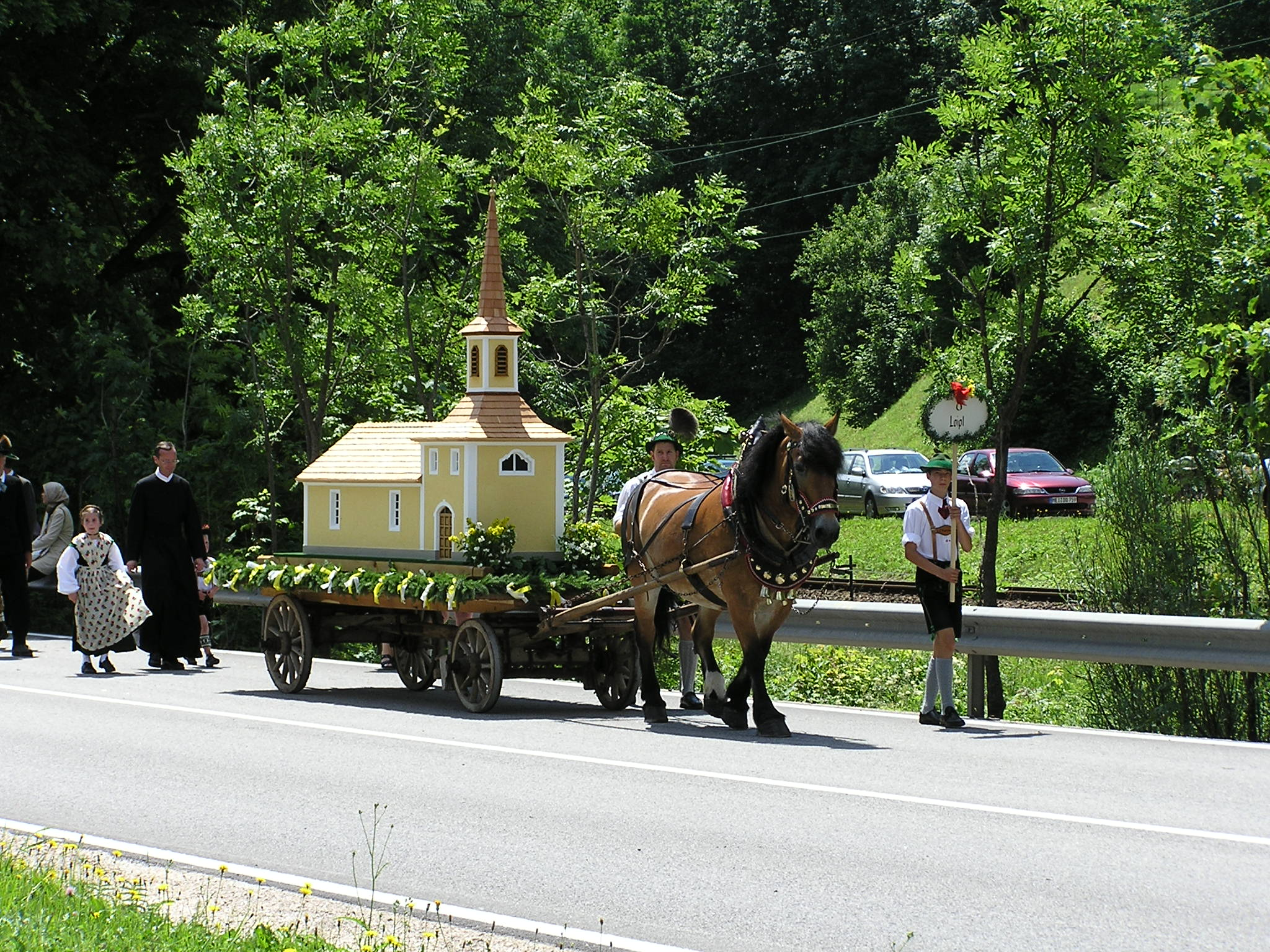 Die Wallfahrtskirche Maria Hilf beim Festumzug der 850-Jahr-Feier Bischofswiesens.